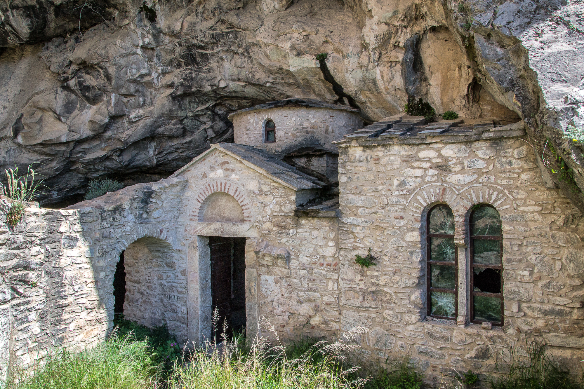 Σπήλαιο Νταβέλη«Σπήλαιο Νταβέλη»